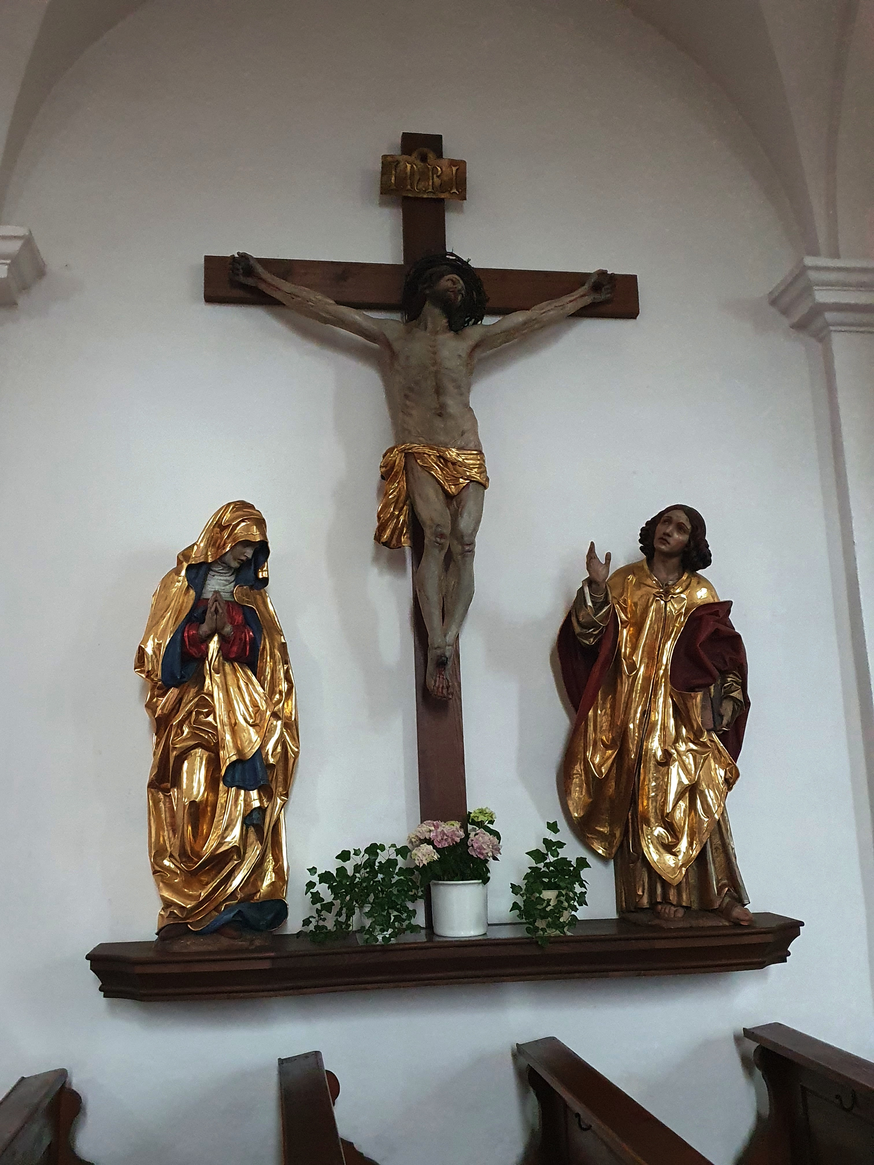 Kreuzigungsgruppe von Johann Georg Mohr 1695 mit Apostel Johannes und Maria